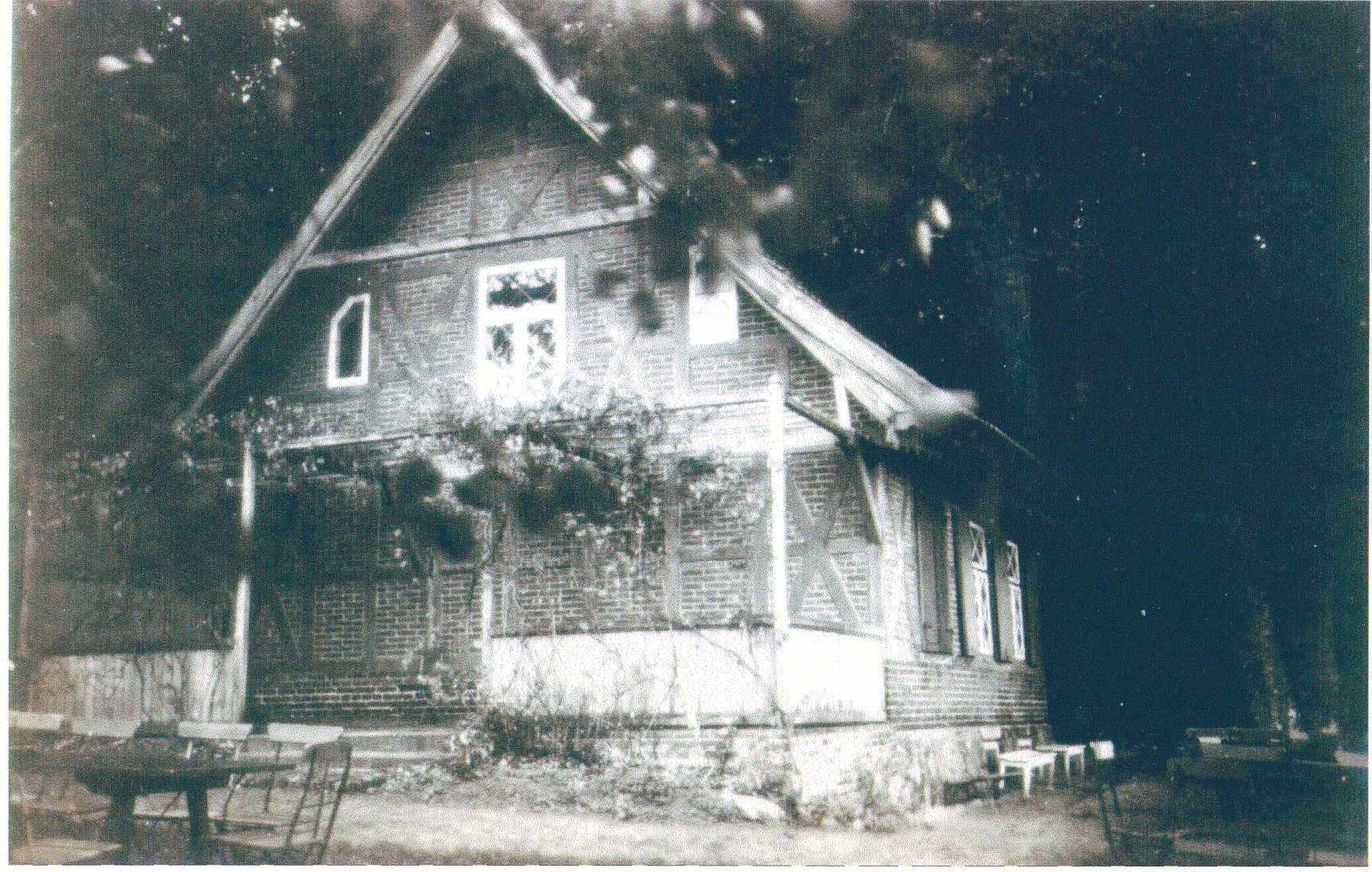 Terrassenseite vom Parkwärterhaus auf der Halbinsel Buchholz bei Goldberg.